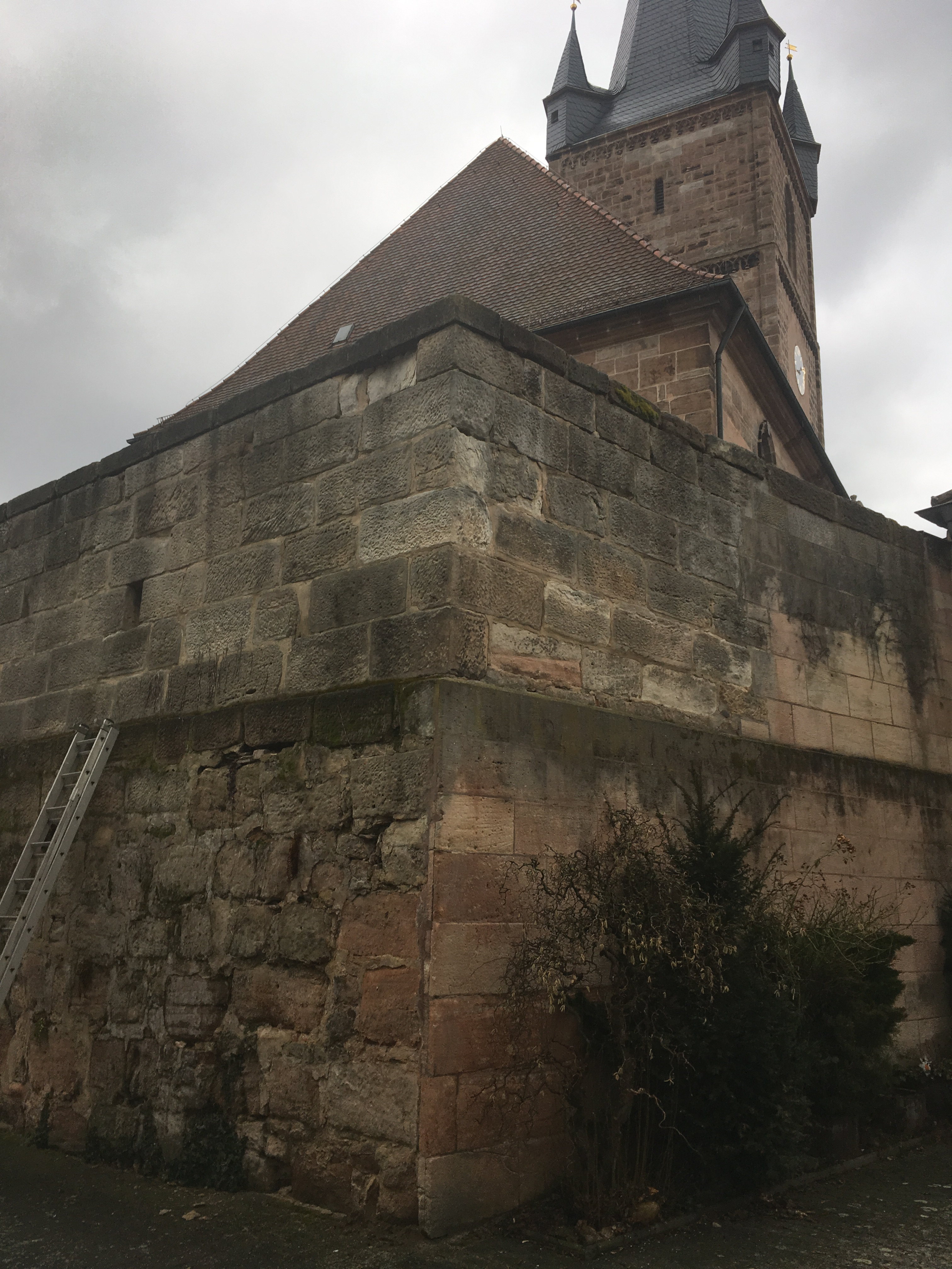 Wehrmauer der Pfarrkirche St. Peter und Paul (Erlangen-Bruck), Ansicht von Südosten